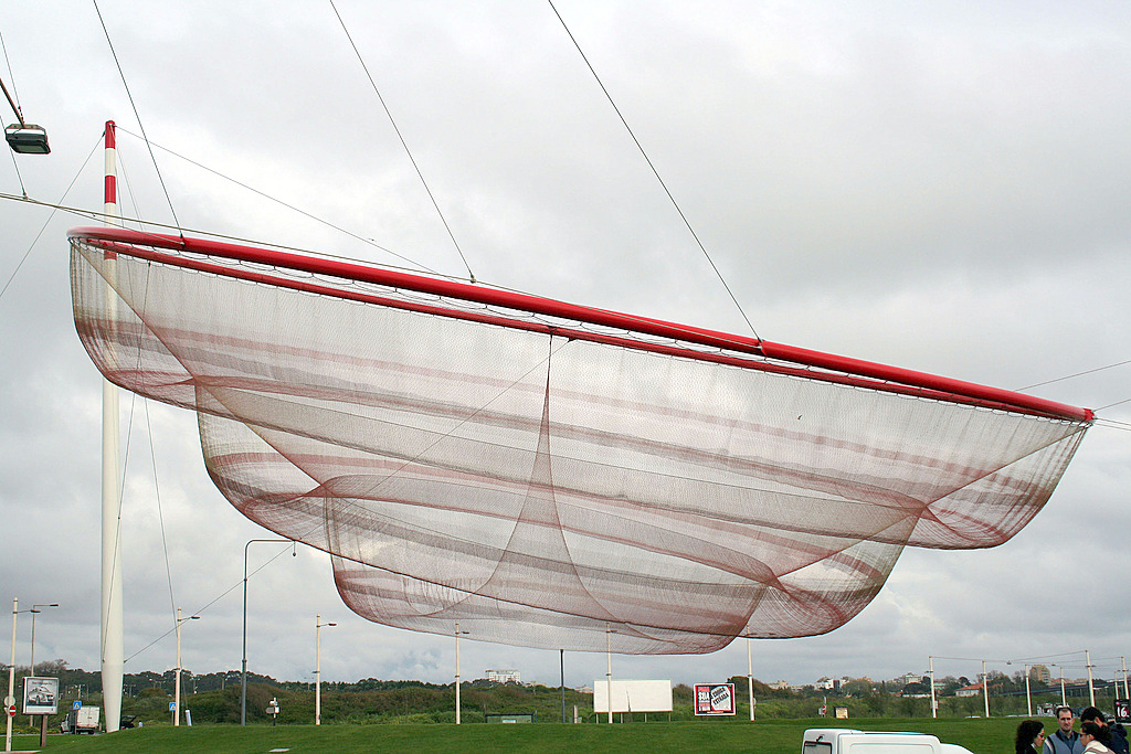 Oporto